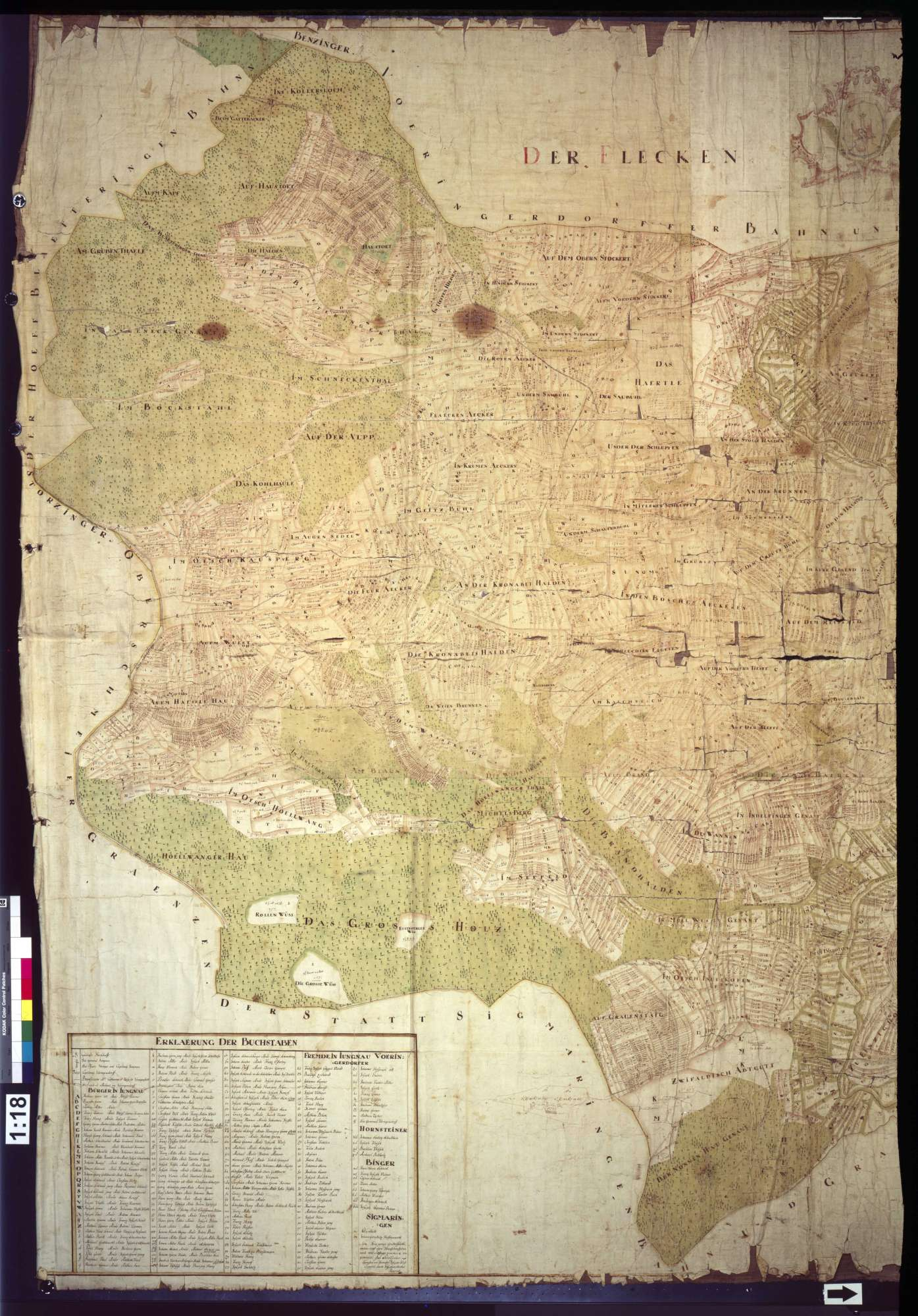 Flecken Jungnau Nutzungsbedingungen ausdrücklich auch für Wikipedia (siehe: [1]